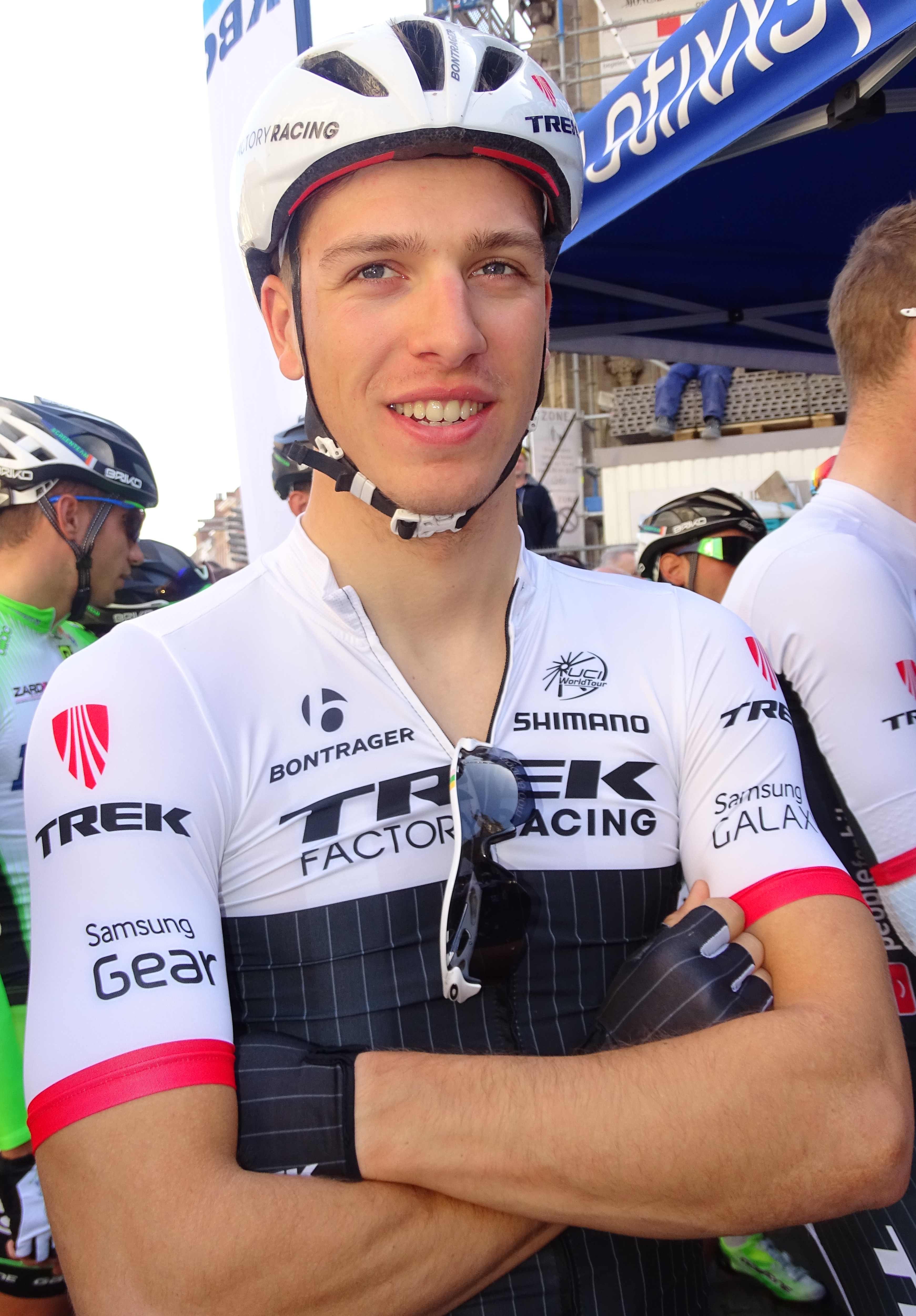 Reportage réalisé le mercredi 15 avril à l'occasion du départ de la Flèche brabançonne 2015 à Louvain, Belgique.